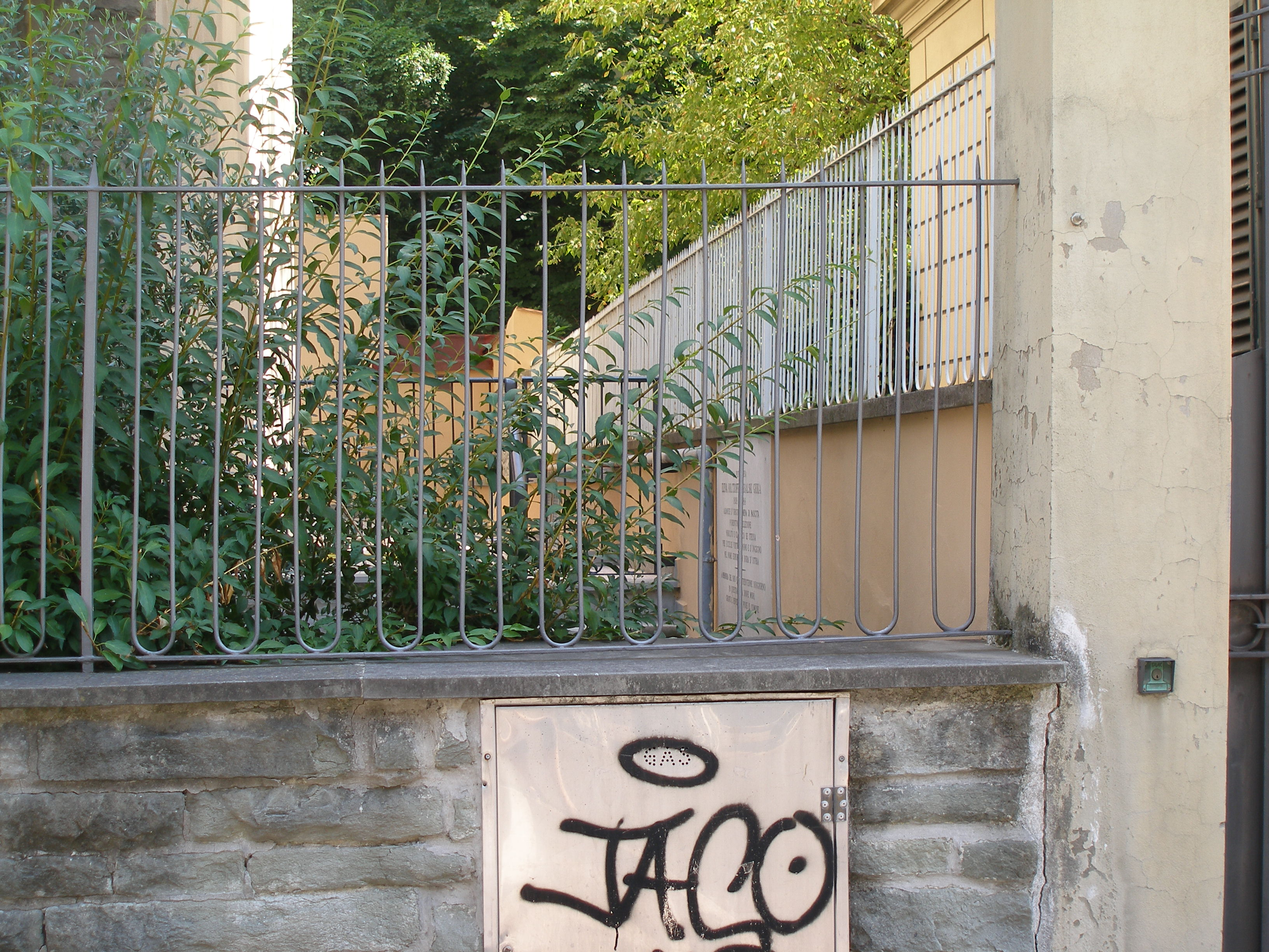 La targa che ricorda Dora d'Istria, affissa nel piccolo giardino condominiale dello stabile, costruito al posto di Villa d'Istria nel 1960, che si trova in via Leonardo da Vinci n. 28.